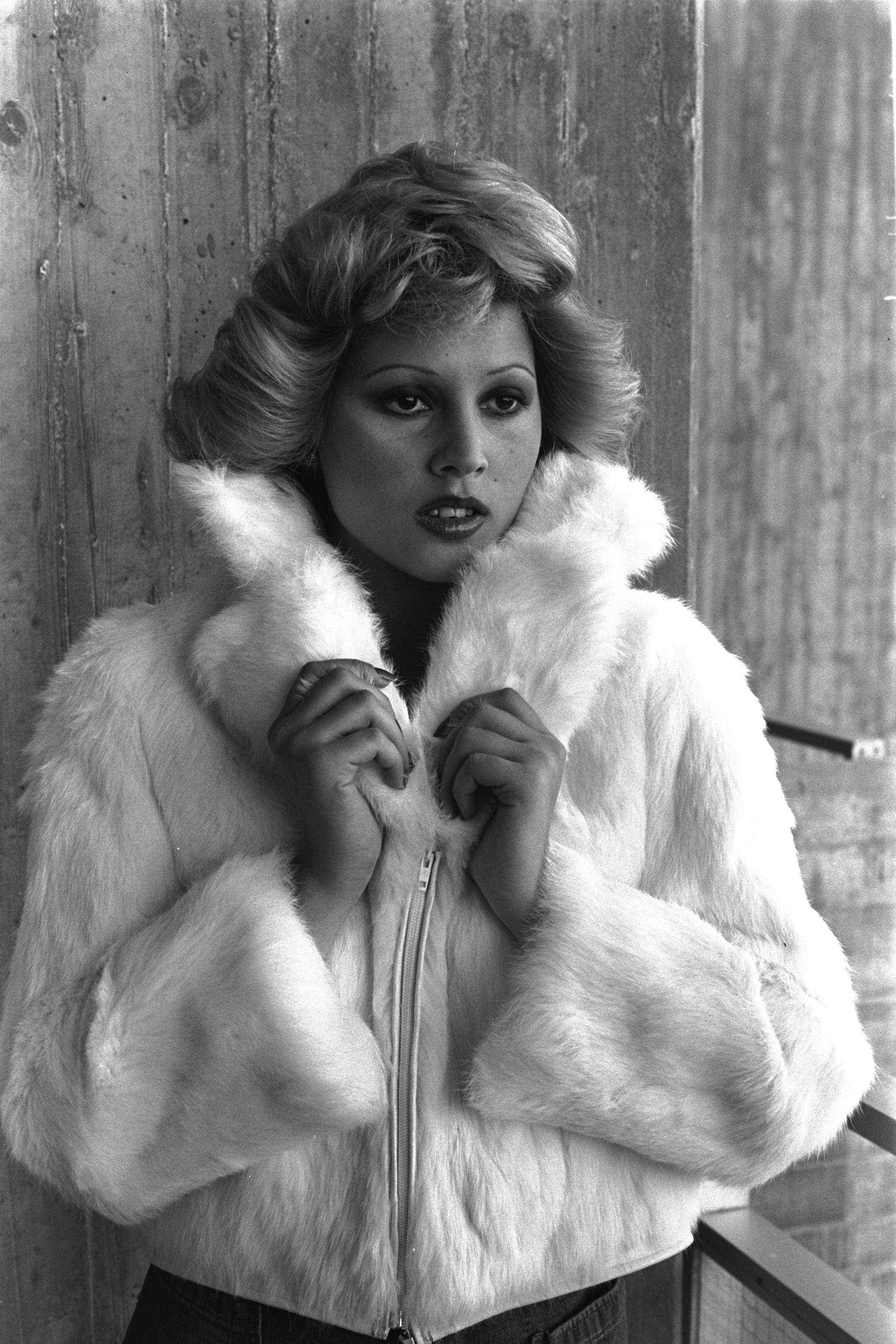 Pnina Rosenblum models a white synthetic battle dress by Tadmor during the Israel Fashion Week at Tel Aviv's Hilton Hotel. פנינה רוזנבלום מדגמת מעיל פרווה סינטטי של חברת טדמור במהלך שבוע האופנה של ישראל